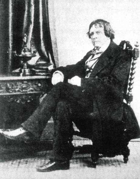 José Joaquín de Mora (Cádiz, 10 de enero de 1783 - Madrid, 3 de octubre de 1864), escritor, educador, periodista, poeta, jurista y político español.